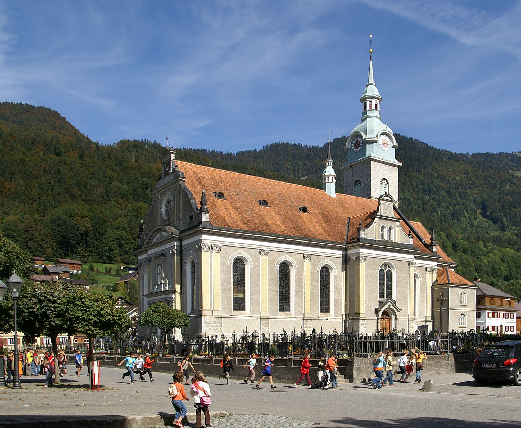 Pfarrkirche St.Jodok 1907/08 in Bezau